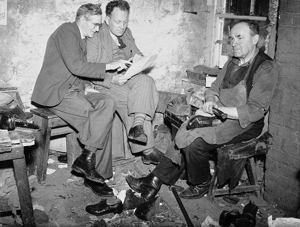 Teitl Cymraeg/Welsh title: Evan Jenkins a David Jones, dau fardd gwlad o Ffair Rhos, yn trafod eu cerddi yng ngweithdy'r crydd. Ffotograffydd/Photographer: Geoff Charles (1909-2002) Dyddiad/Date: November 12, 1959. Cyfrwng/Medium: Negydd ffilm / Film negative Cyfeiriad/Reference: (gch21170) Rhif cofnod / Record no.: 3470438 Rhagor o wybodaeth am gasgliad Geoff Charles yn Llyfrgell Genedlaethol Cymru More information about the Geoff Charles Collection at the National Library of Wales